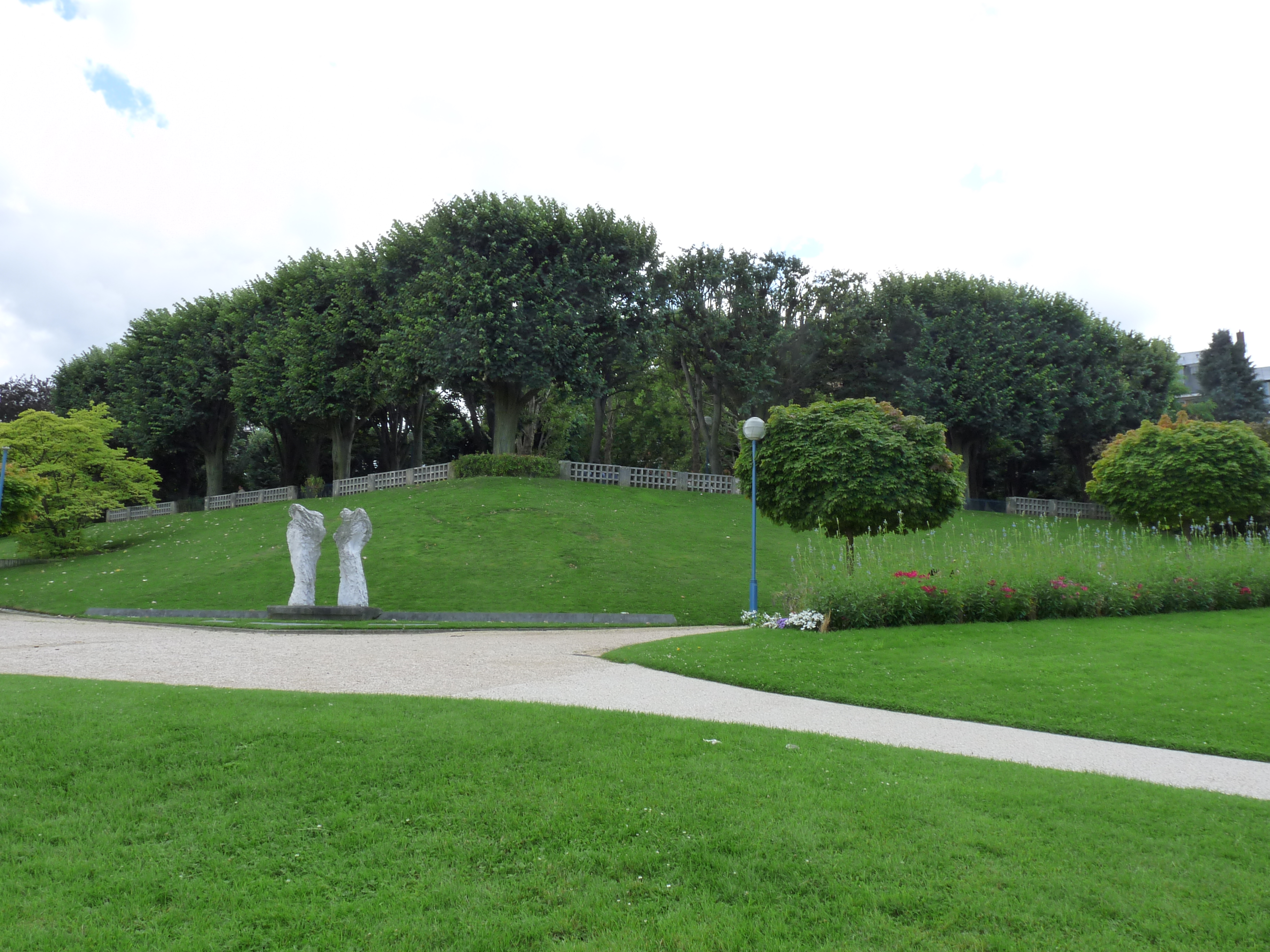 Le parc de la butte du Chapeau-Rouge a Paris